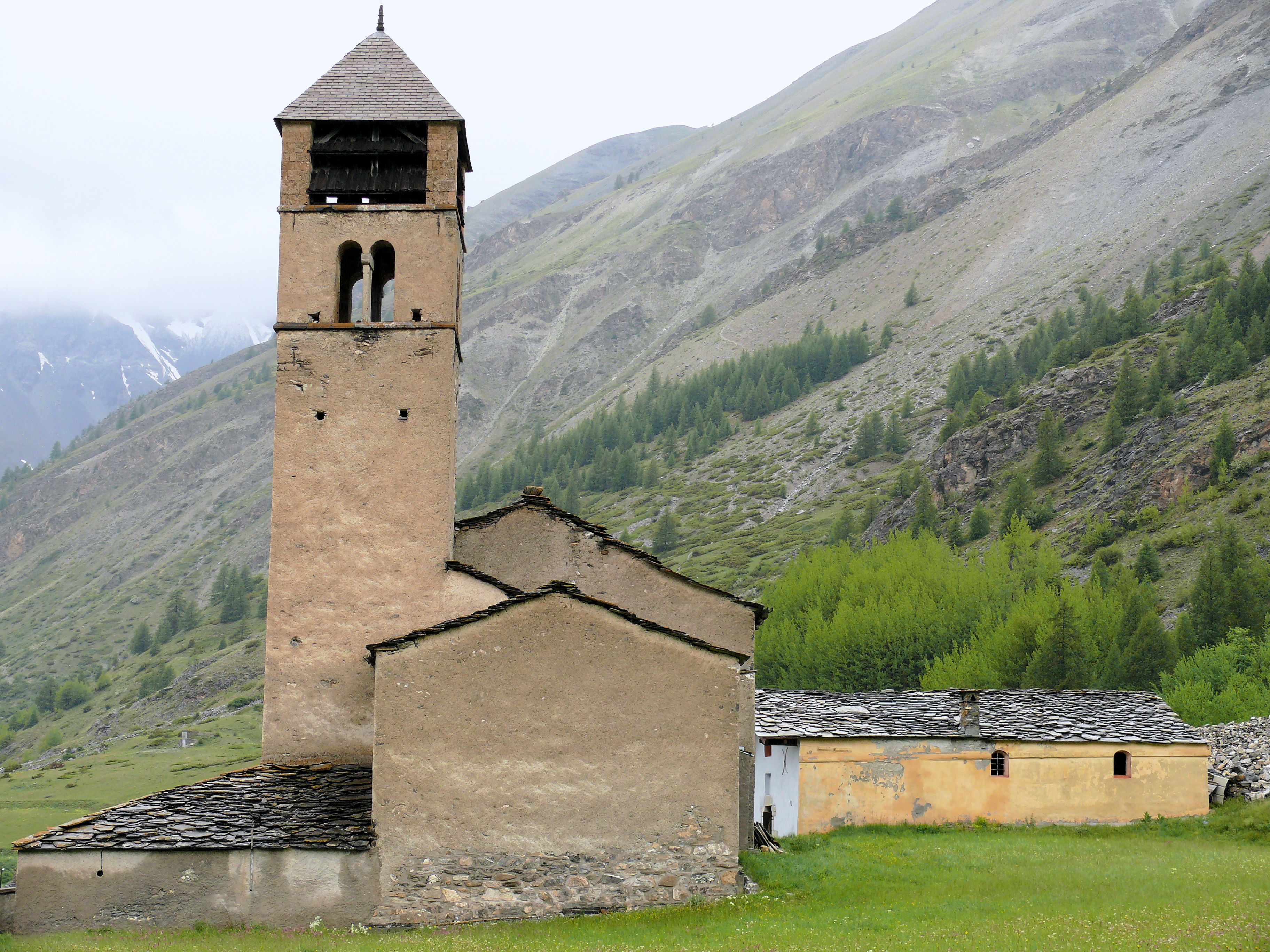 Saint-Paul-sur-Ubaye - Eglise Saint-Antoine-du-Désert et chapelle des Pénitents, à Maurin